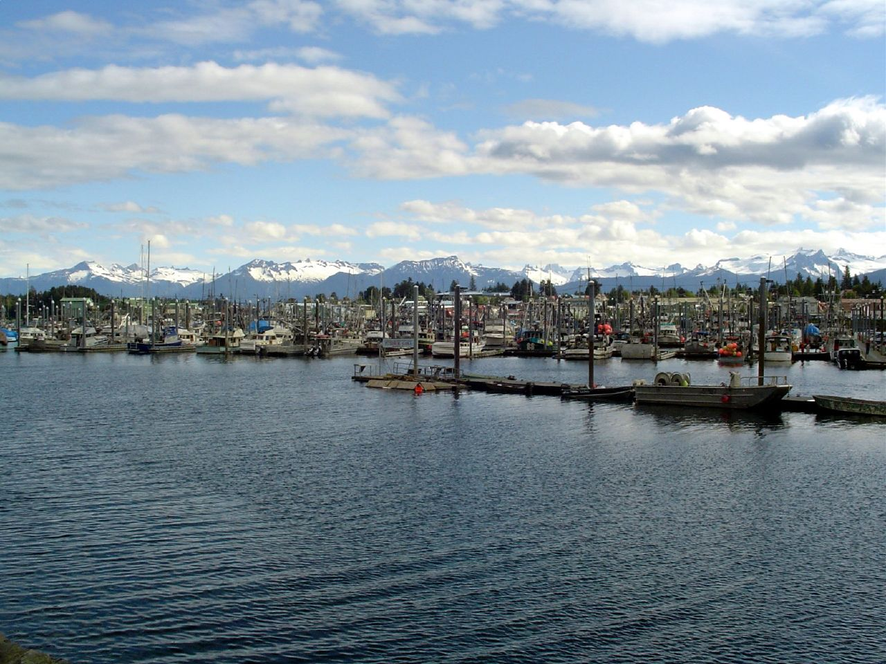 Petersburg, Alaska